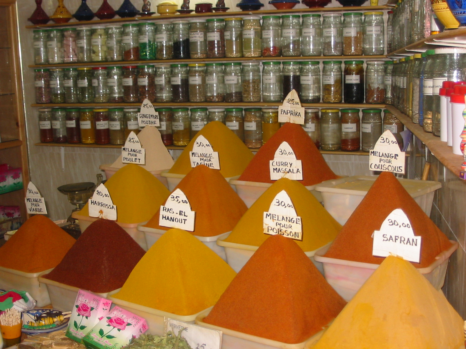 Morocco, Spices